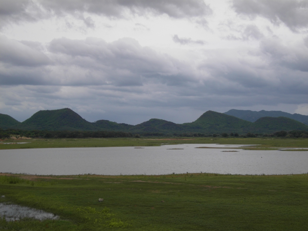 Khao Kra Puk, Tha Yang District, Phetchaburi, Thailand